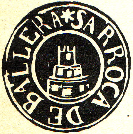 Segell municipal de Sarroca de Bellera vers el 1900 (Pallars Jussà)